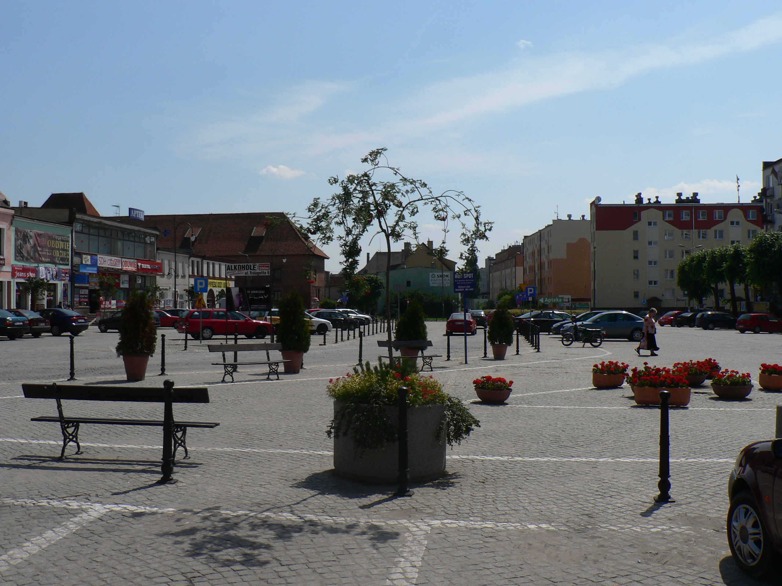 Plac Wolności w Nidzicy, widok spod Ratusza